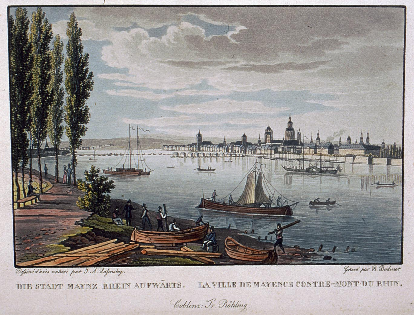 Altkolorierter Aquatintastich von R.Bodmer nach Vorlage von J.A. Lasinsky